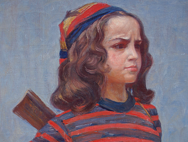 "Fausto" av Johan Axel Gustaf Acke (bilden är beskuren)